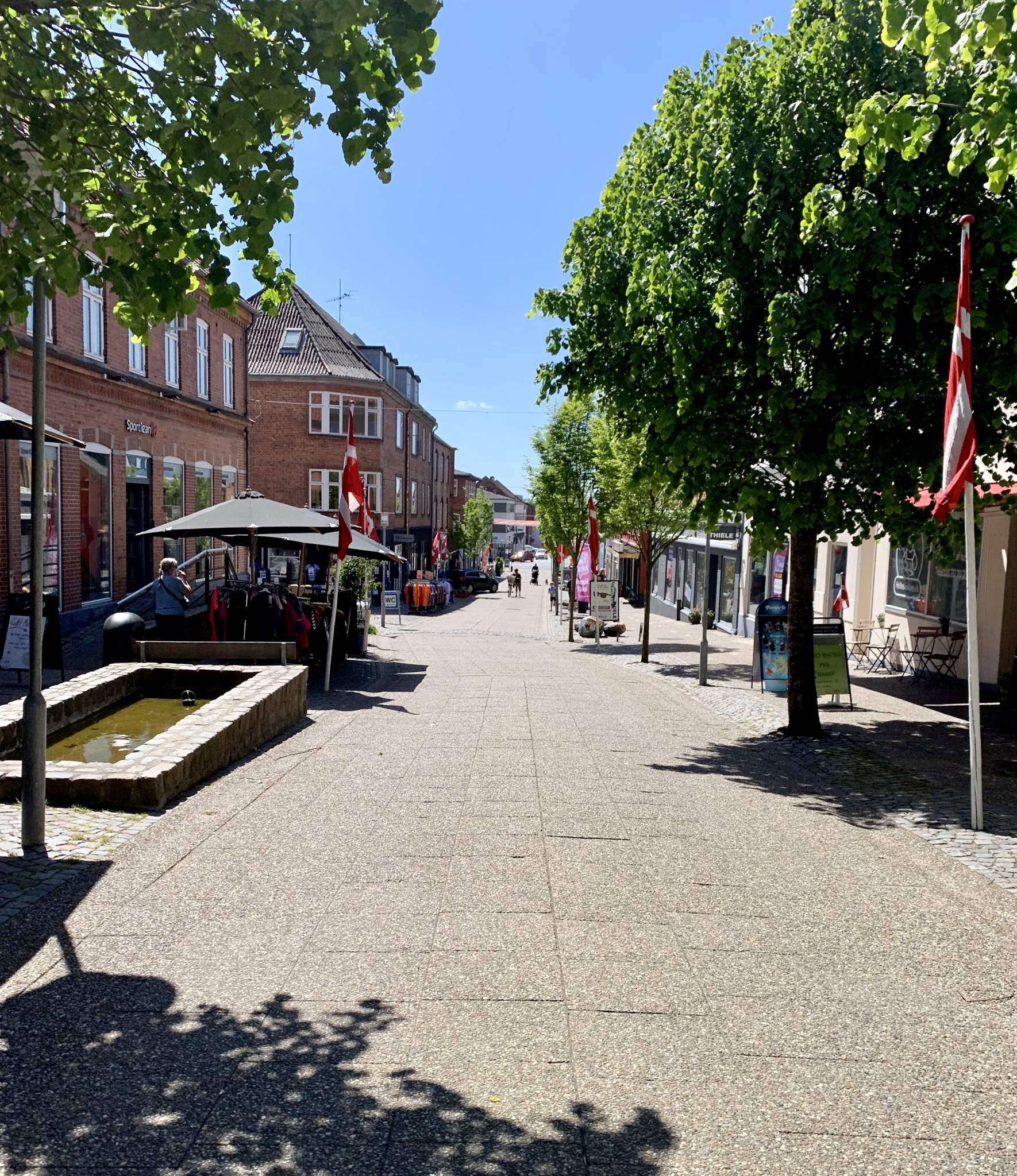 Storegade i Hadsund, 2020